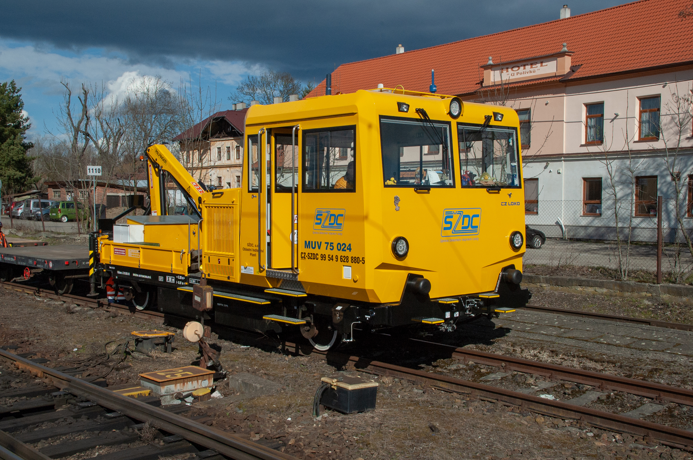 MUV 75 024 ve stanici Číčenice